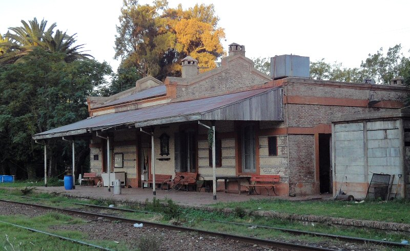 Estación M. J. García del FCDFS, Buenos Aires, Argentina